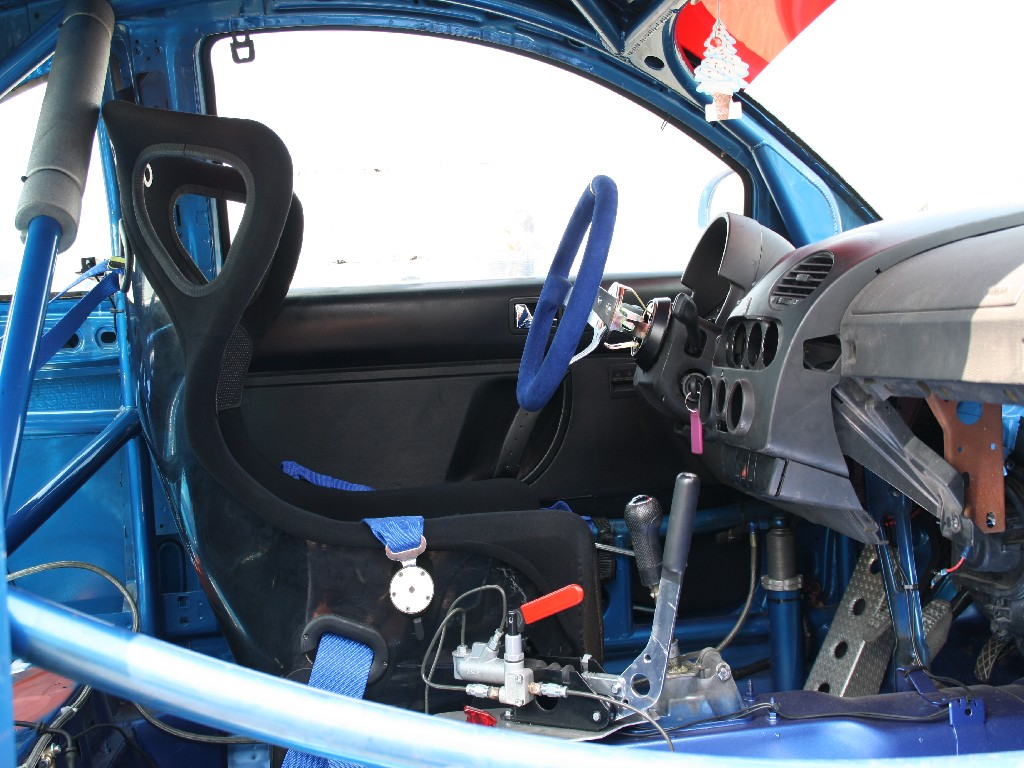 Innenraum eines VW New Beetle Cup